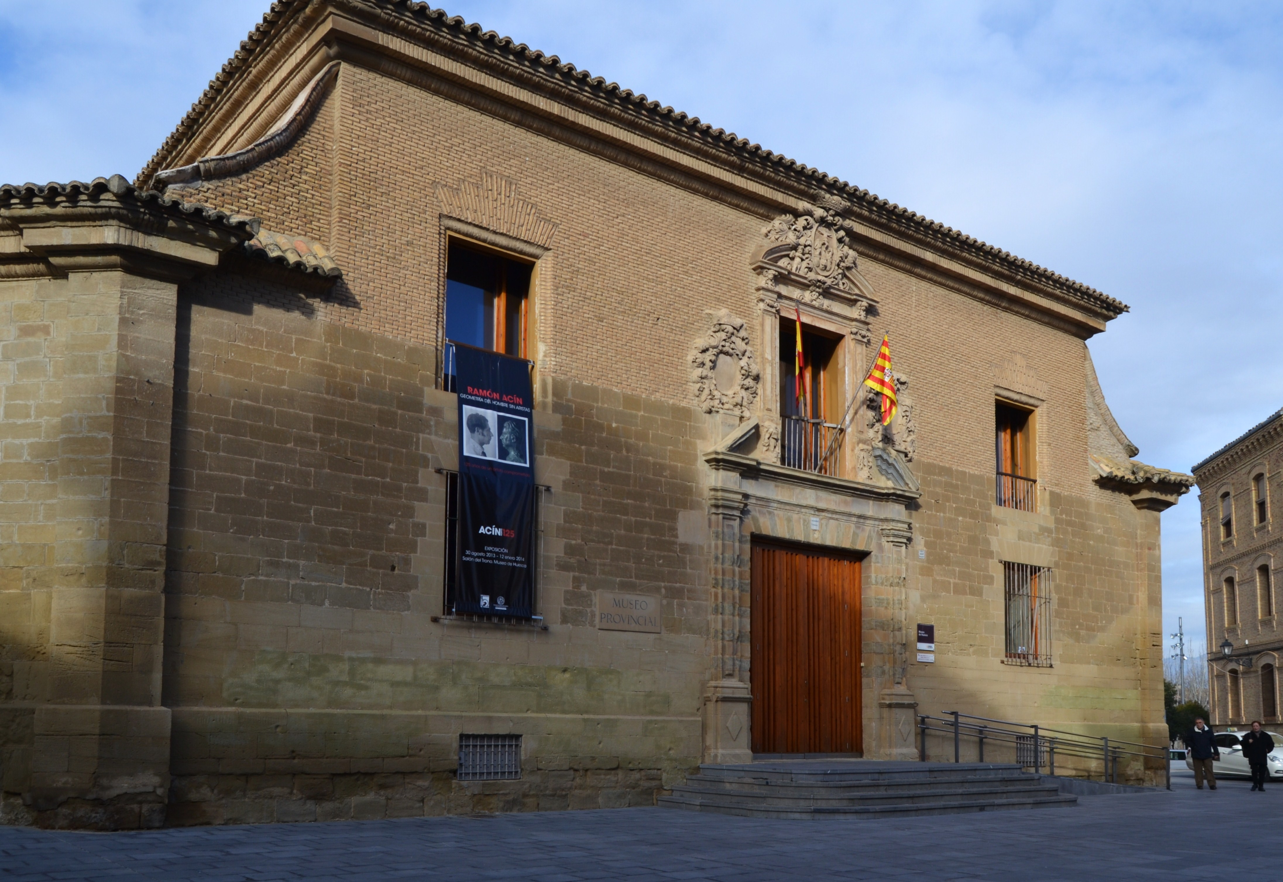 Edifici de la universitat, actual museu d'Osca.